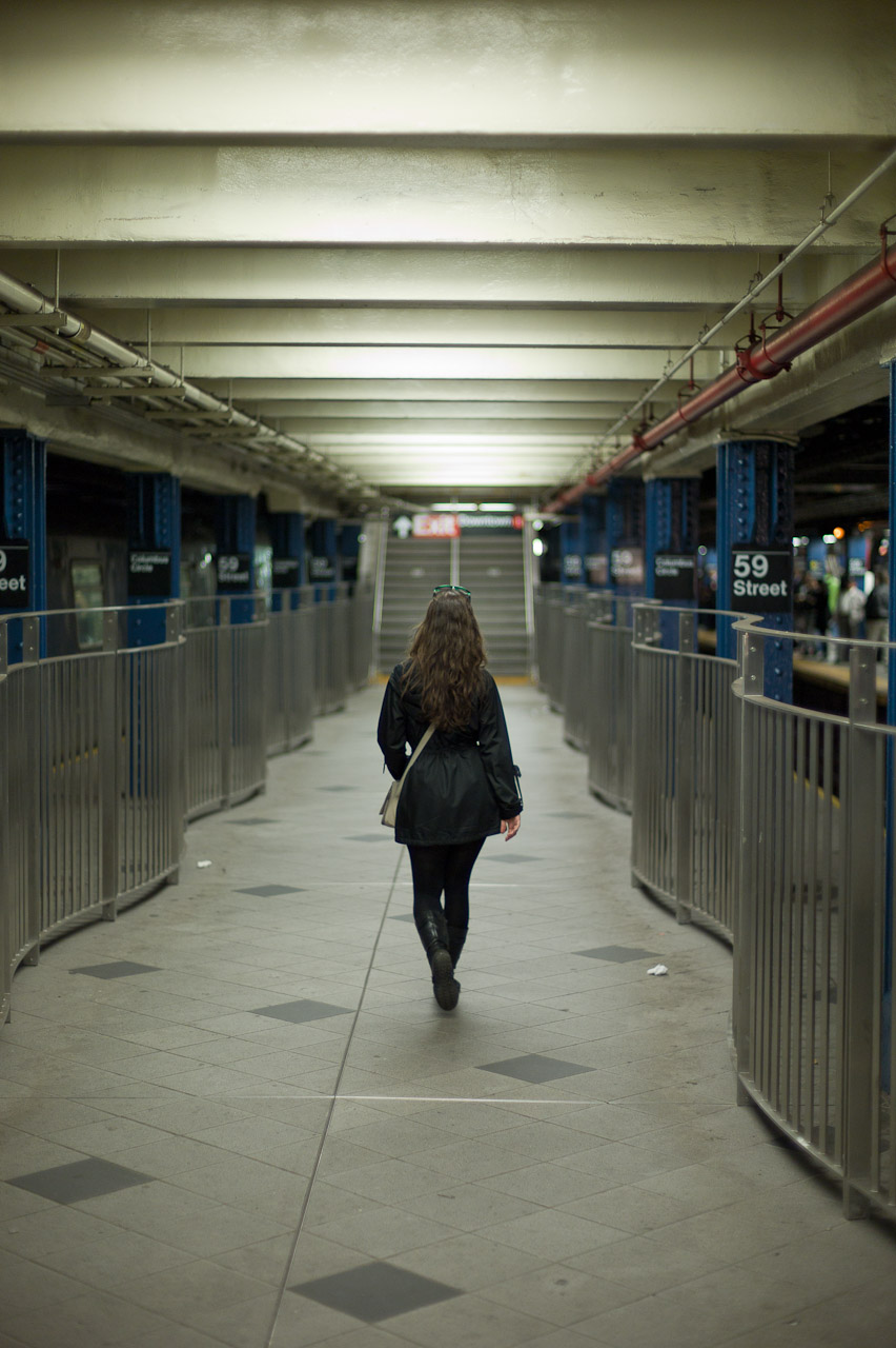 L1002043